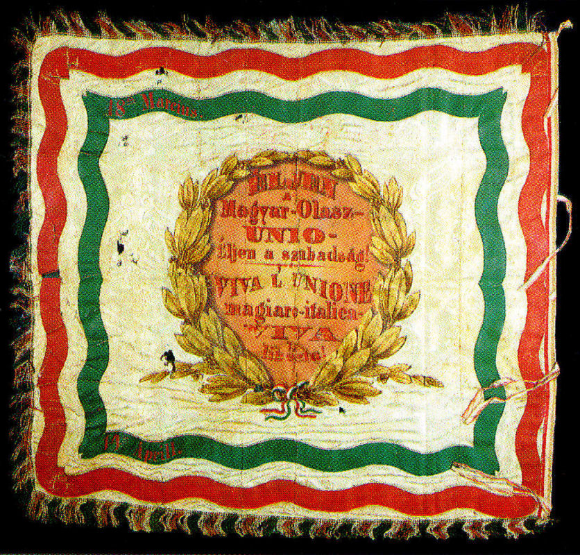 A magyarországi olasz légió zászlaja 1849-ben